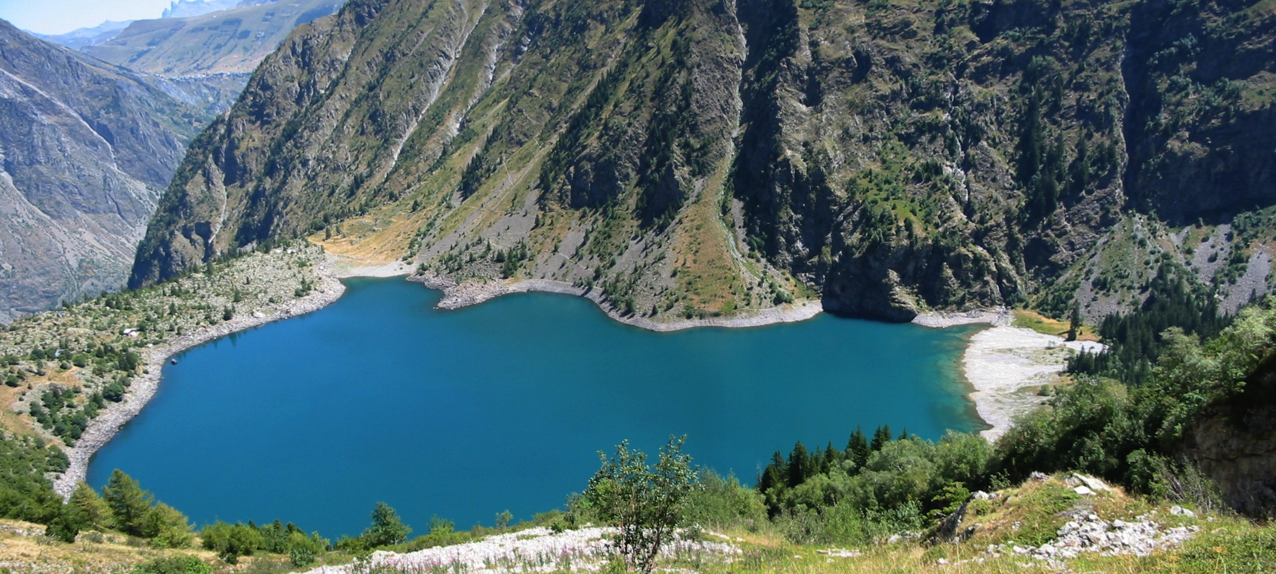 Lac du Lauvitel